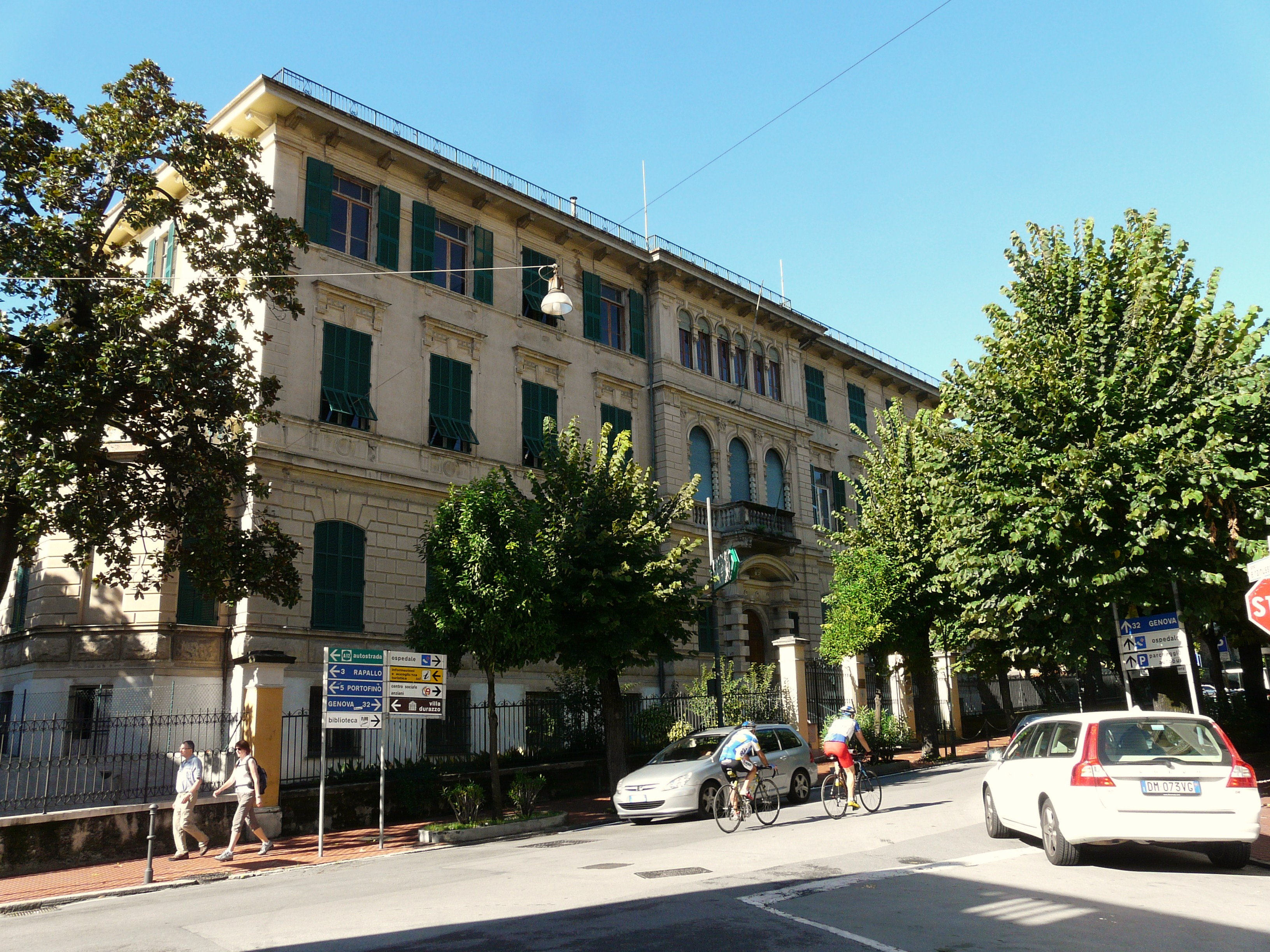 Sede amministrativa del Parco naturale regionale di Portofino e dell'Area naturale marina protetta Portofino, Santa Margherita Ligure, Liguria, Italia